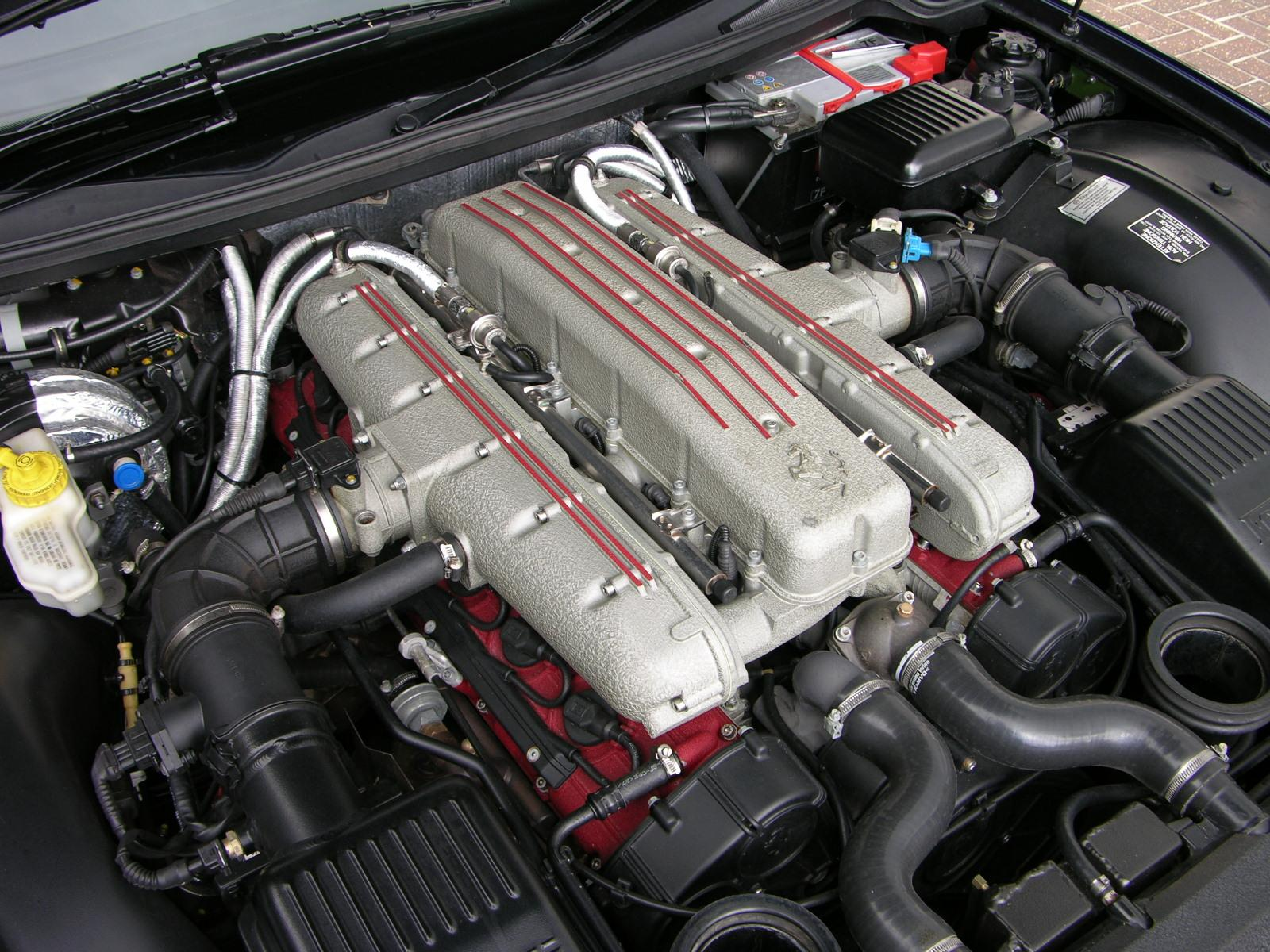 Ferrari 550 Maranello